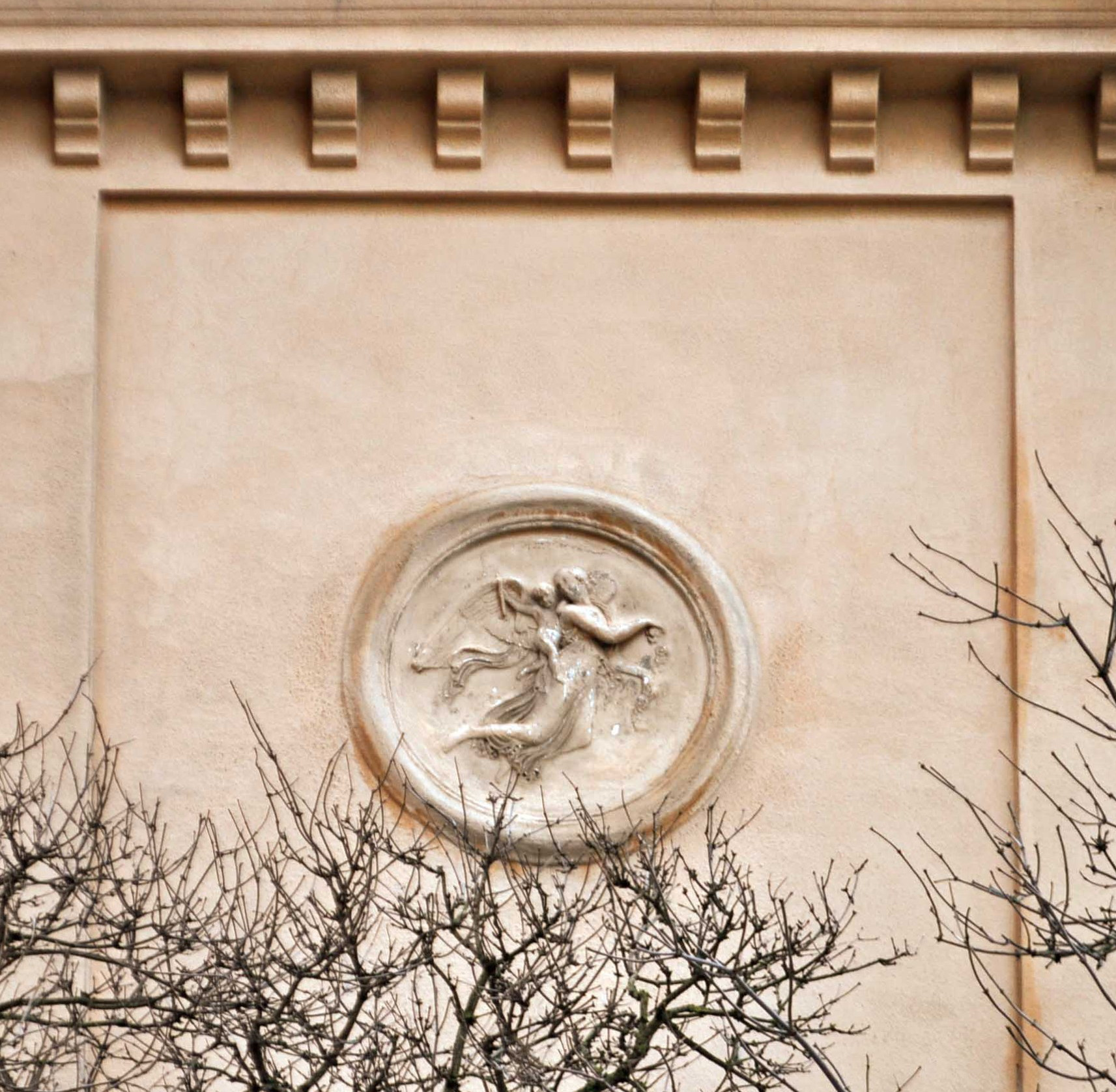 Cederborgska villan, detalj, februari 2012.